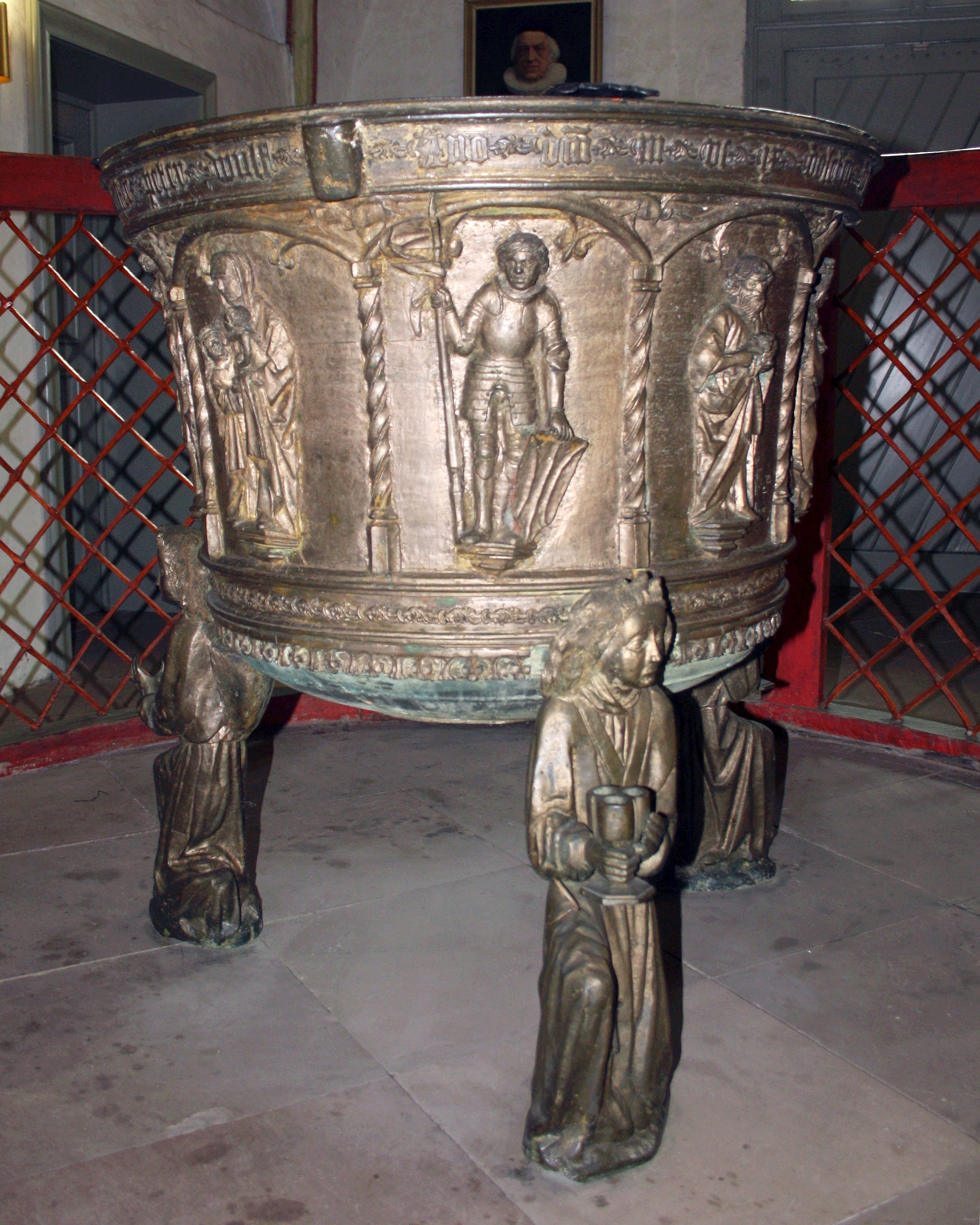 Taufbecken in St. Nicolai in Mölln, Schleswig-Holstein, gegossen 1509 von Peter Wulf